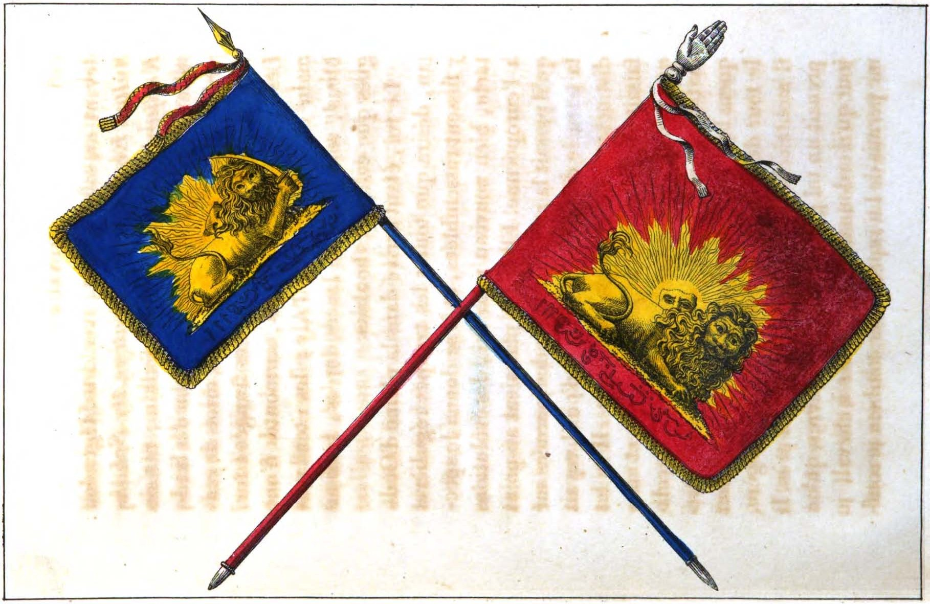 Drapeau et etendard persans